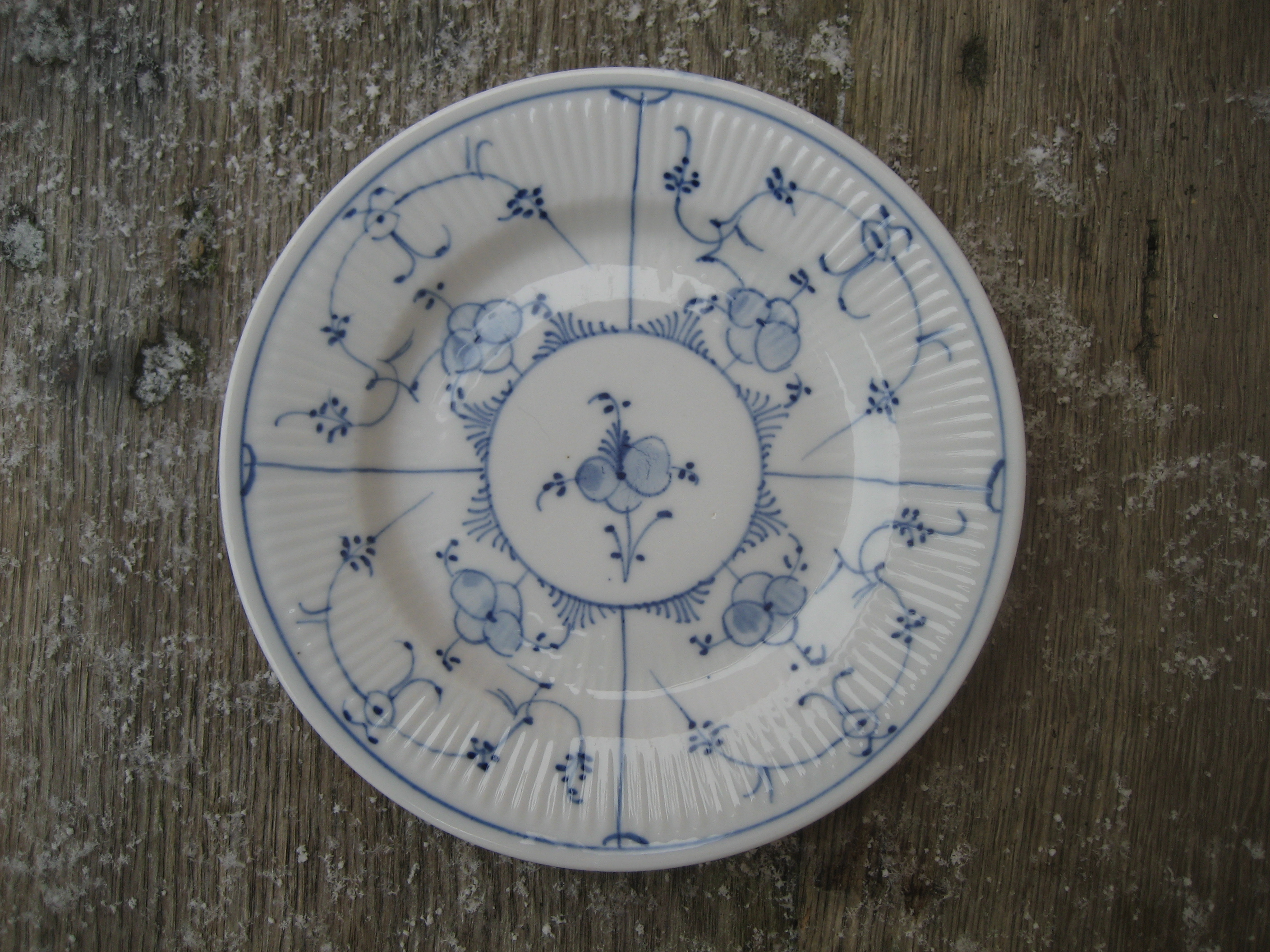 Teller mit Strohblumenmuster oder Indisch Blau Dekor.